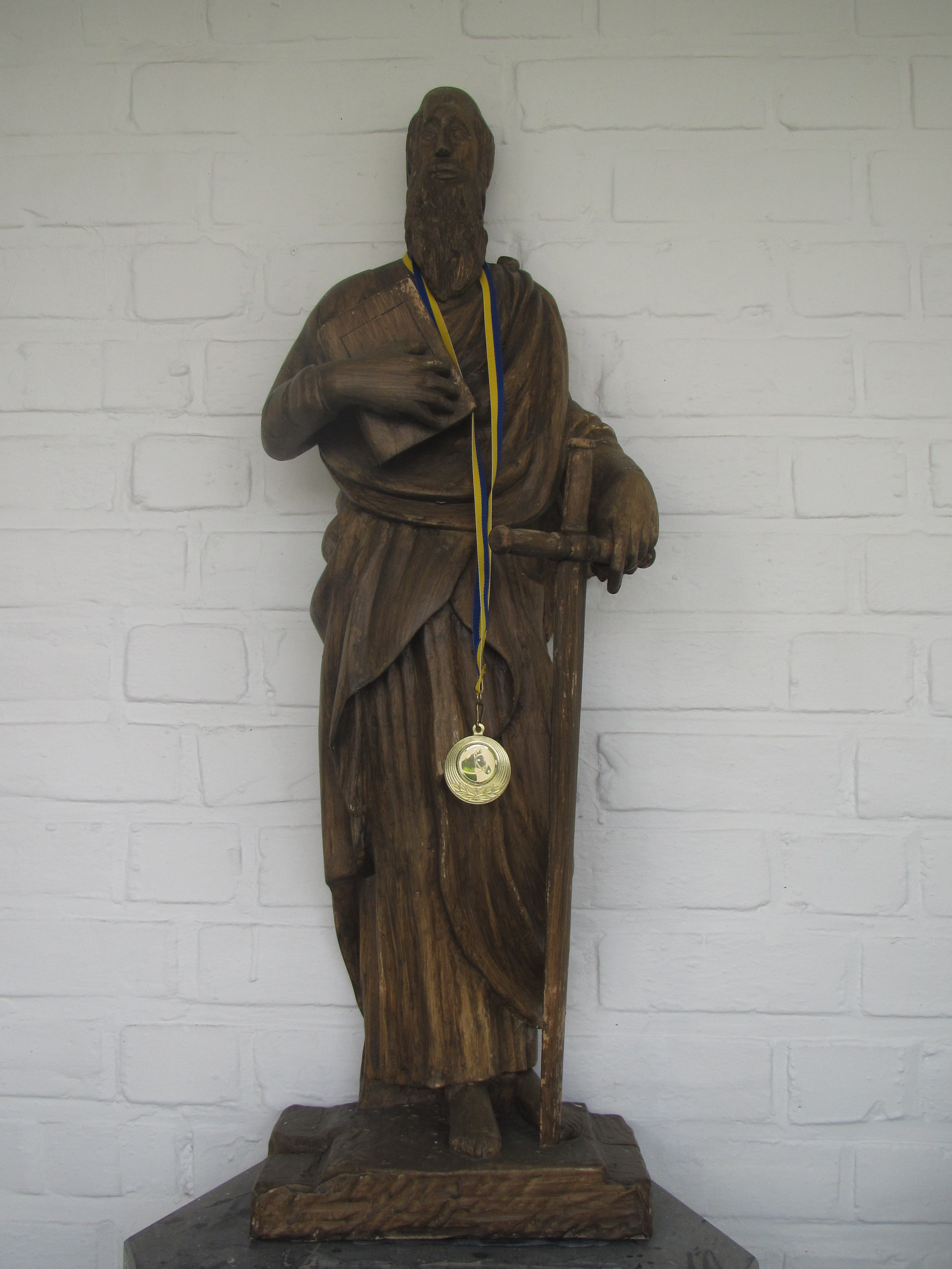 Sint-Paulusbeeld dat opgesteld staat in de Sint-Pauluskapel te Opwijk en gemaakt werd door Gust De Block in 2003, na diefstal van het vorige beeld Het beeld draagt de herinneringsmedaille, die alle deelnemers aan de Sint-Pauluspaardenprocessie van 2014 ontvingen